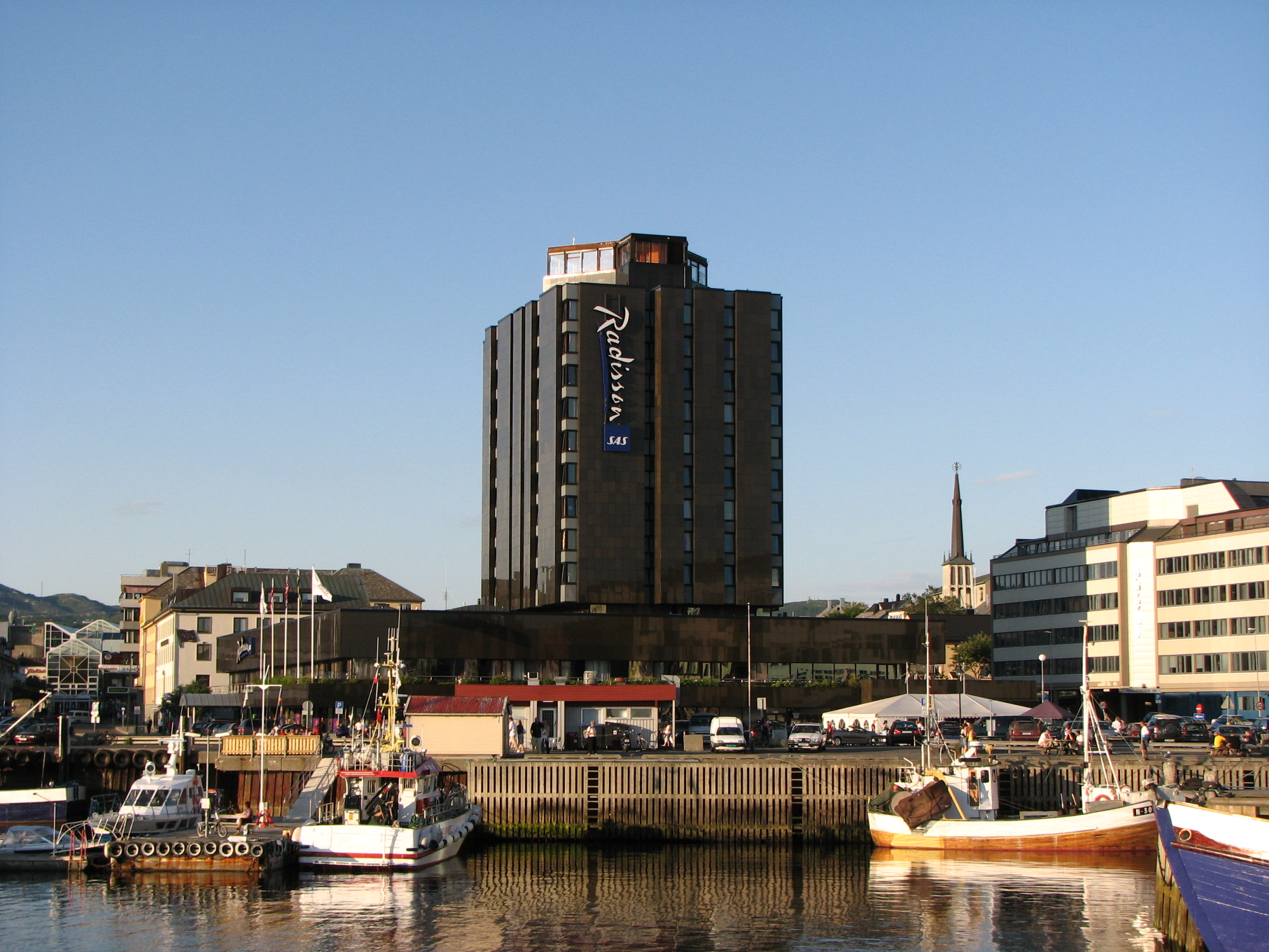 NB:SAS-hotellet (Bodø) sommeren 2007.